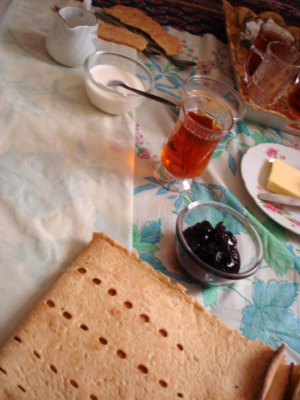 Sofré, tovaglia cerata Iraniana